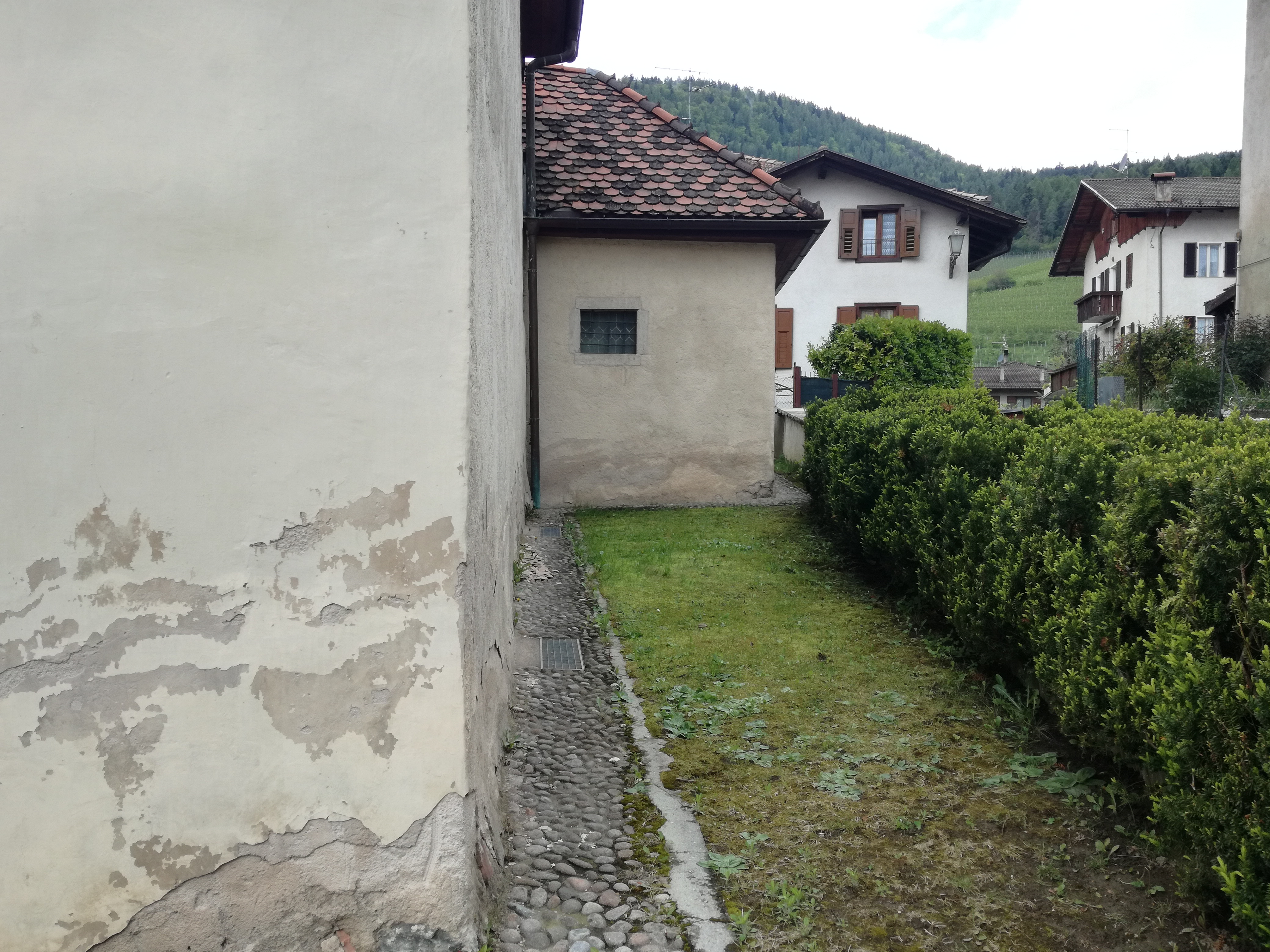 Fiancata destra della Chiesa con l'aderente e annesso corpo della Sacrestia